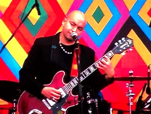 Фото американо-мексиканского гитариста Омара Торреса, сделанное во время его выступления на фестивале "Белые ночи в Перми" 02.06.2012